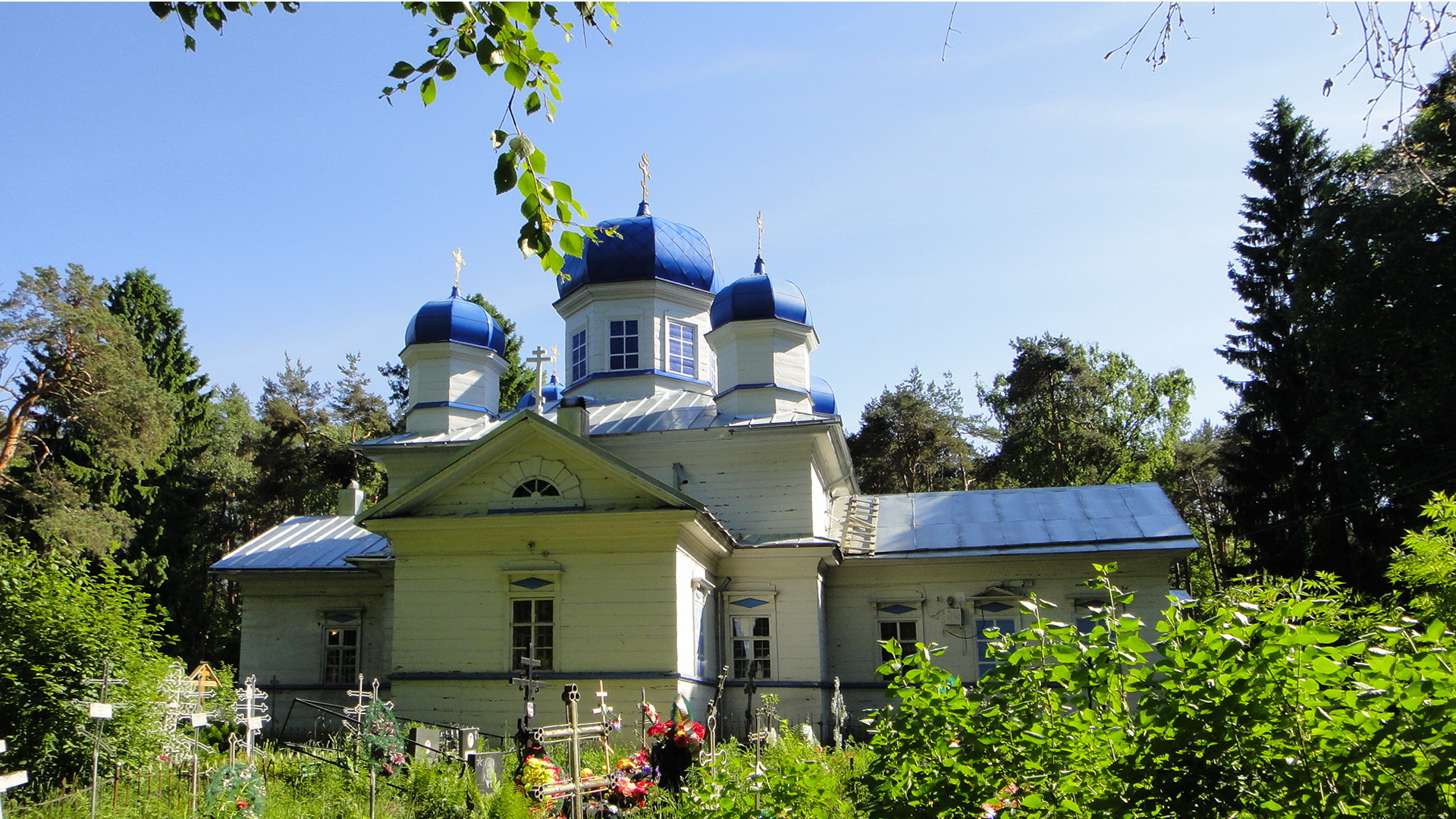 Церковь Успения Пресвятой Богородицы (Республика Карелия, Олонец, кладбище в Кунелицах)